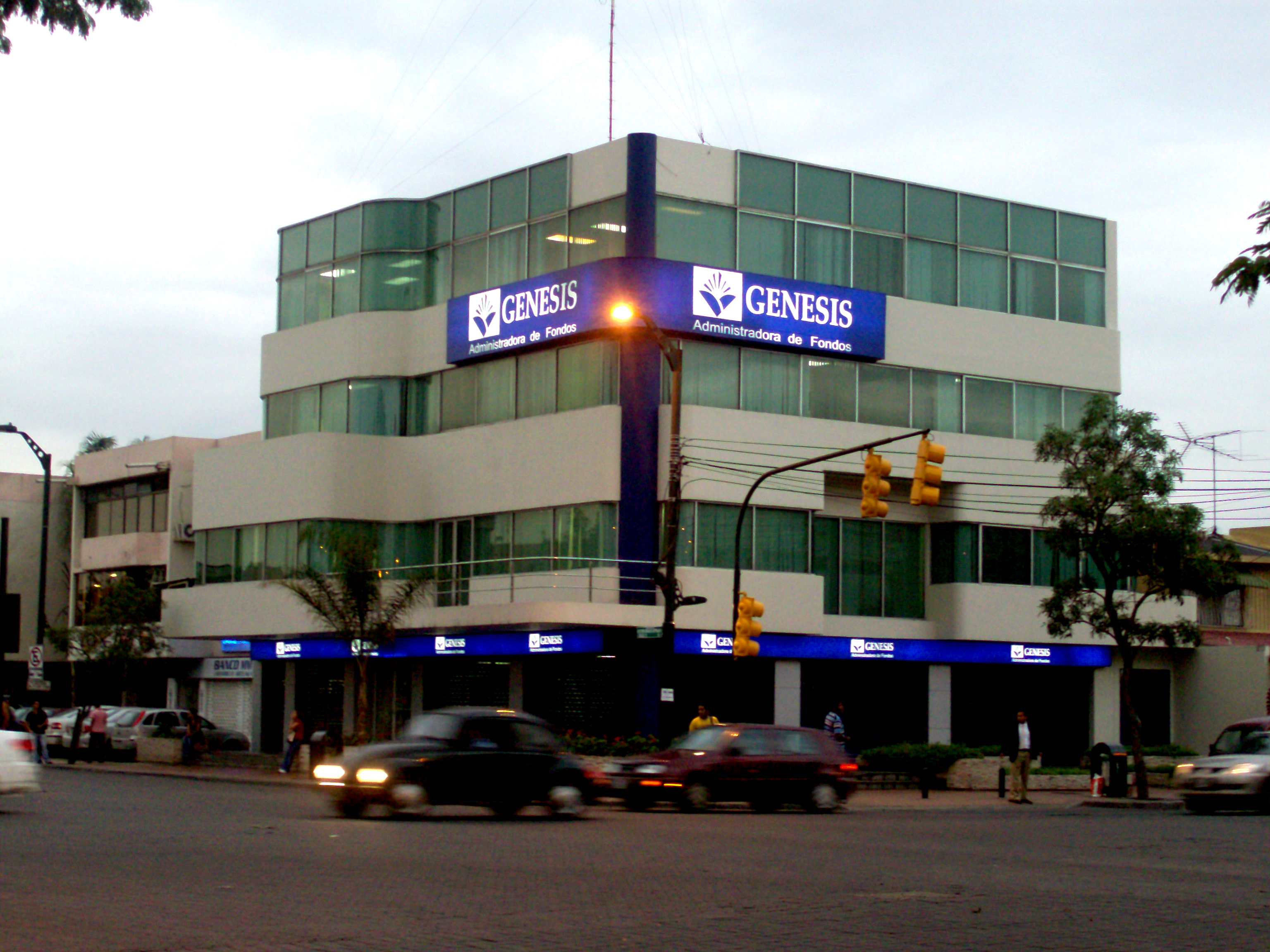 Agencia de Genesis, Urdesa, Guayaquil